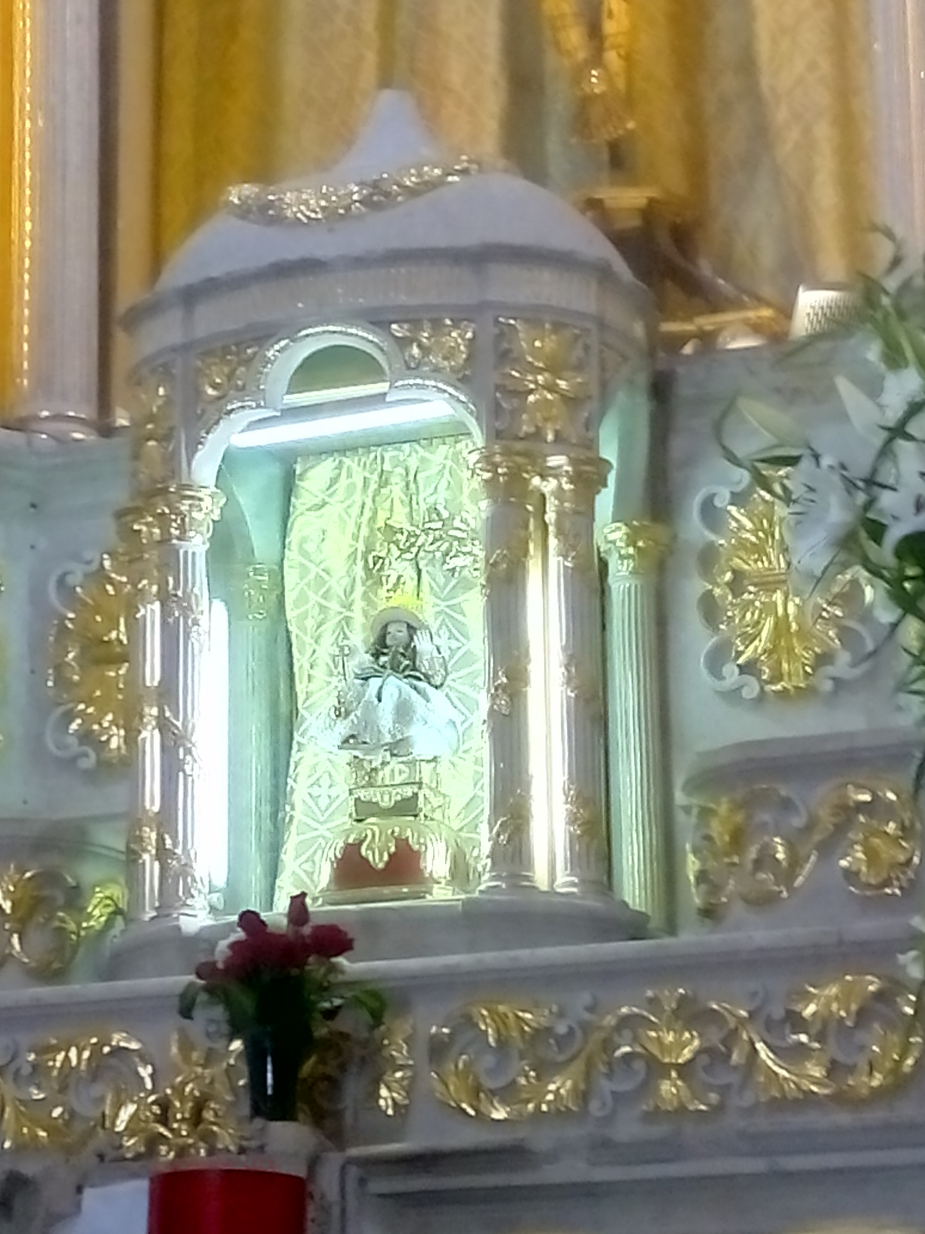 Santuario (interior)